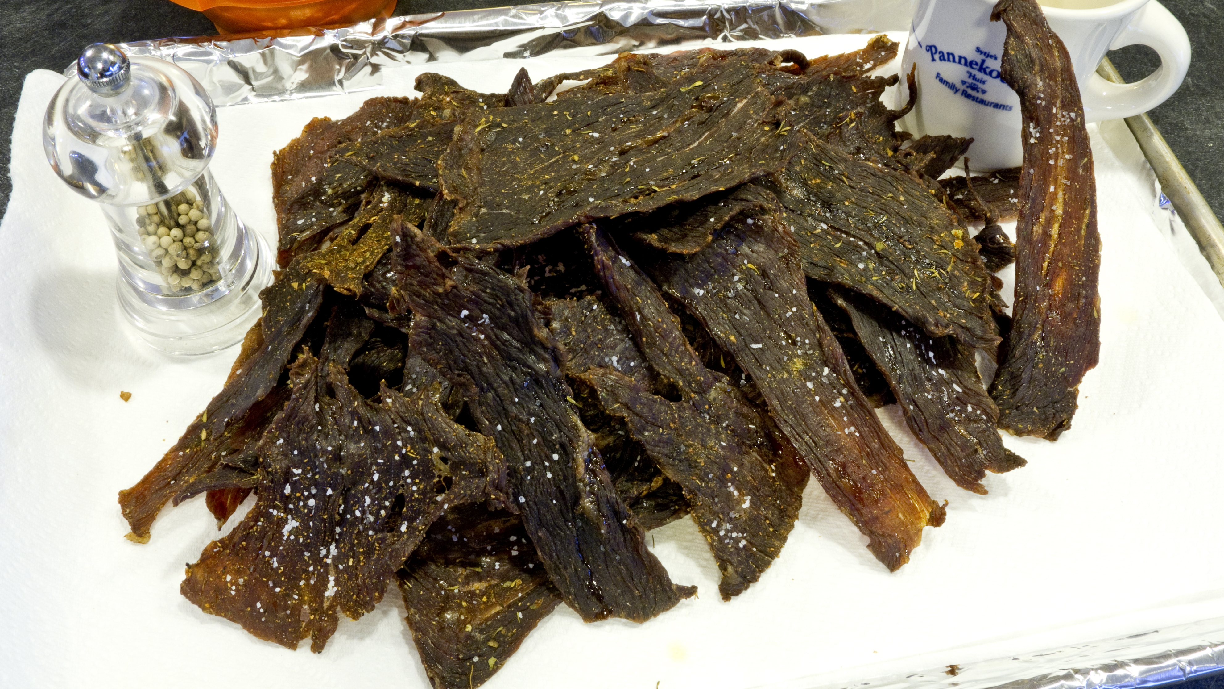 Jerky